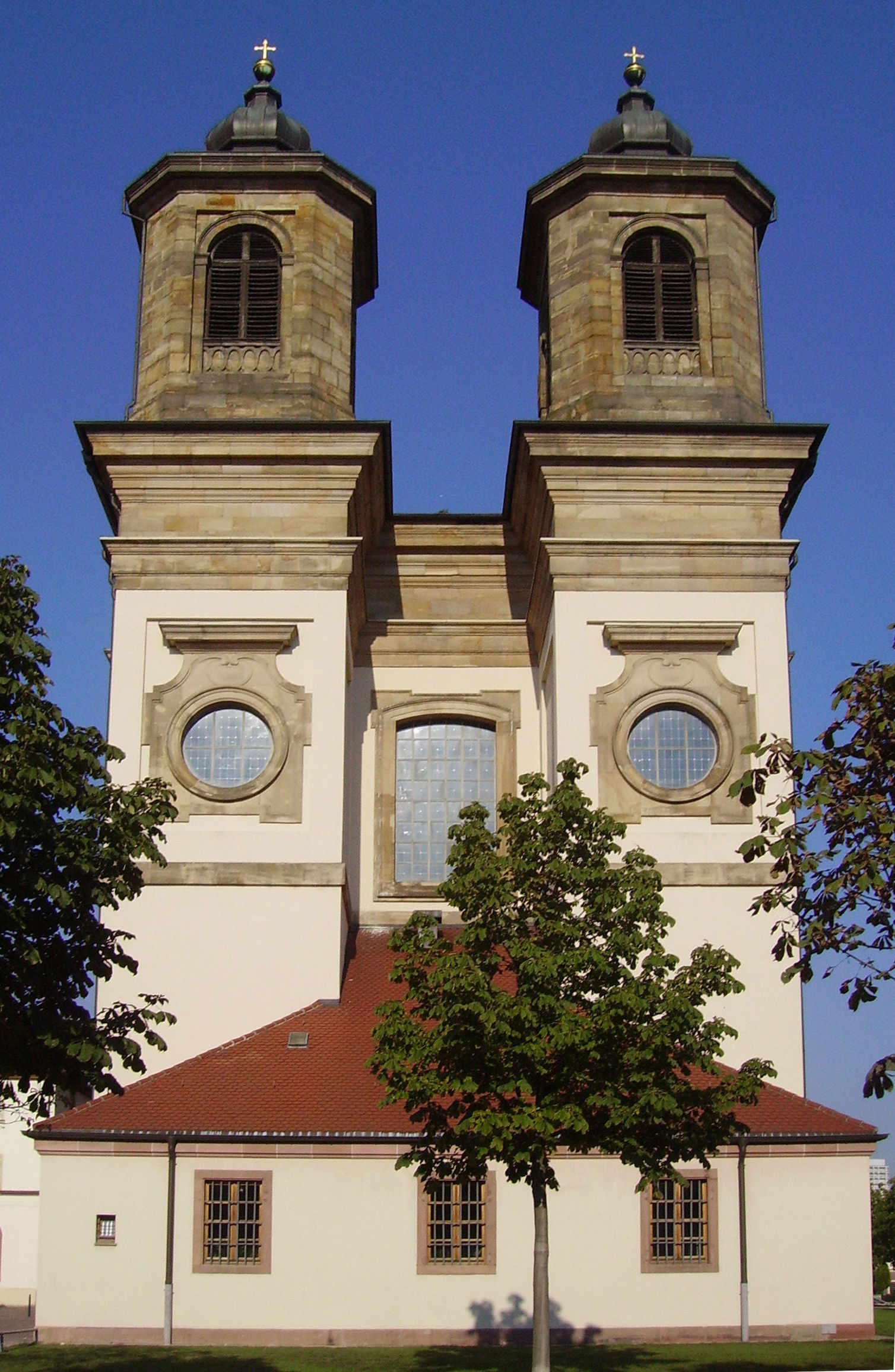 Wallfahrtskirche Mariä Himmelfahrt Ludwigshafen-Oggersheim